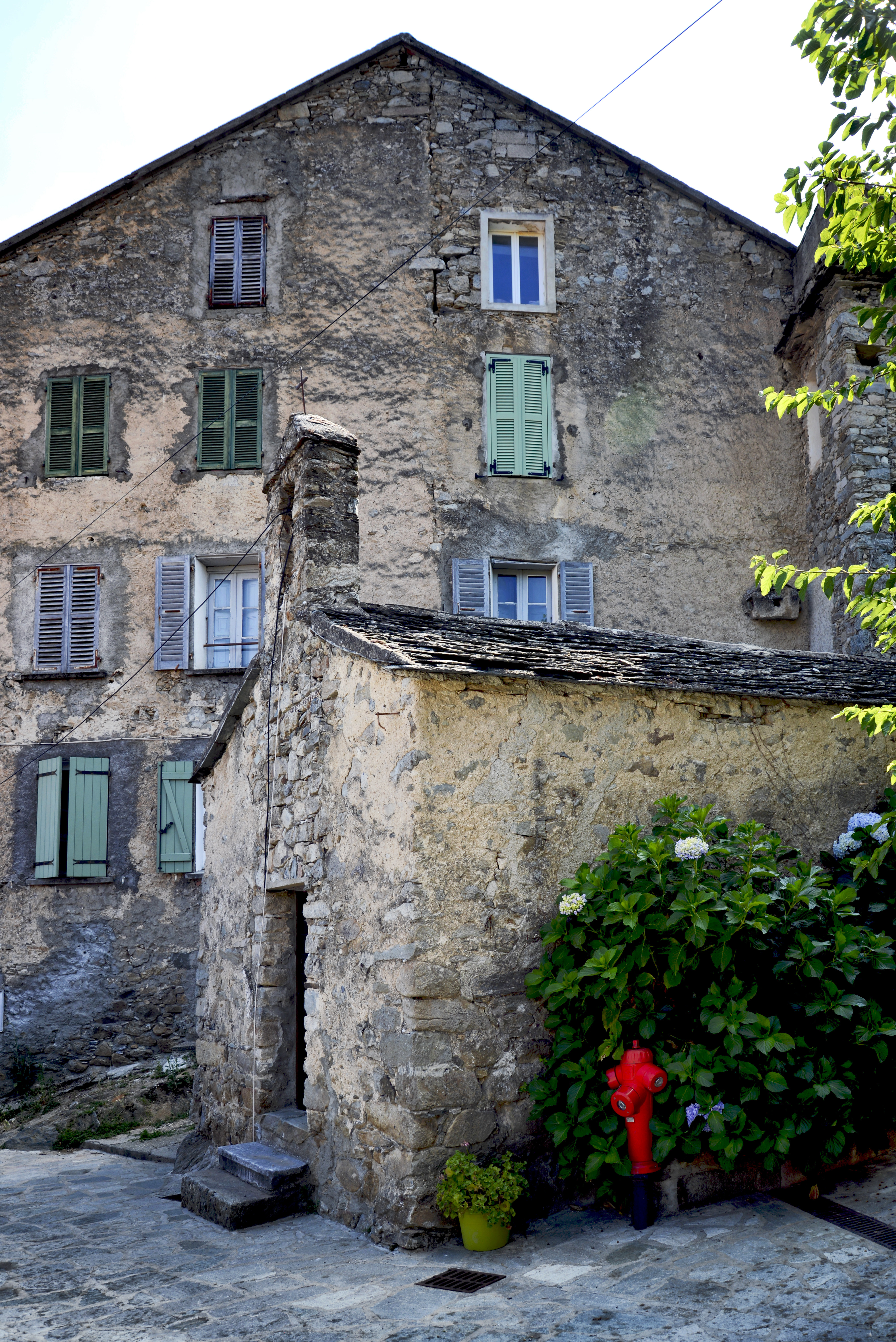 Venaco, Centre Corse - Chapelle Saint-Roch à Campo Vecchio